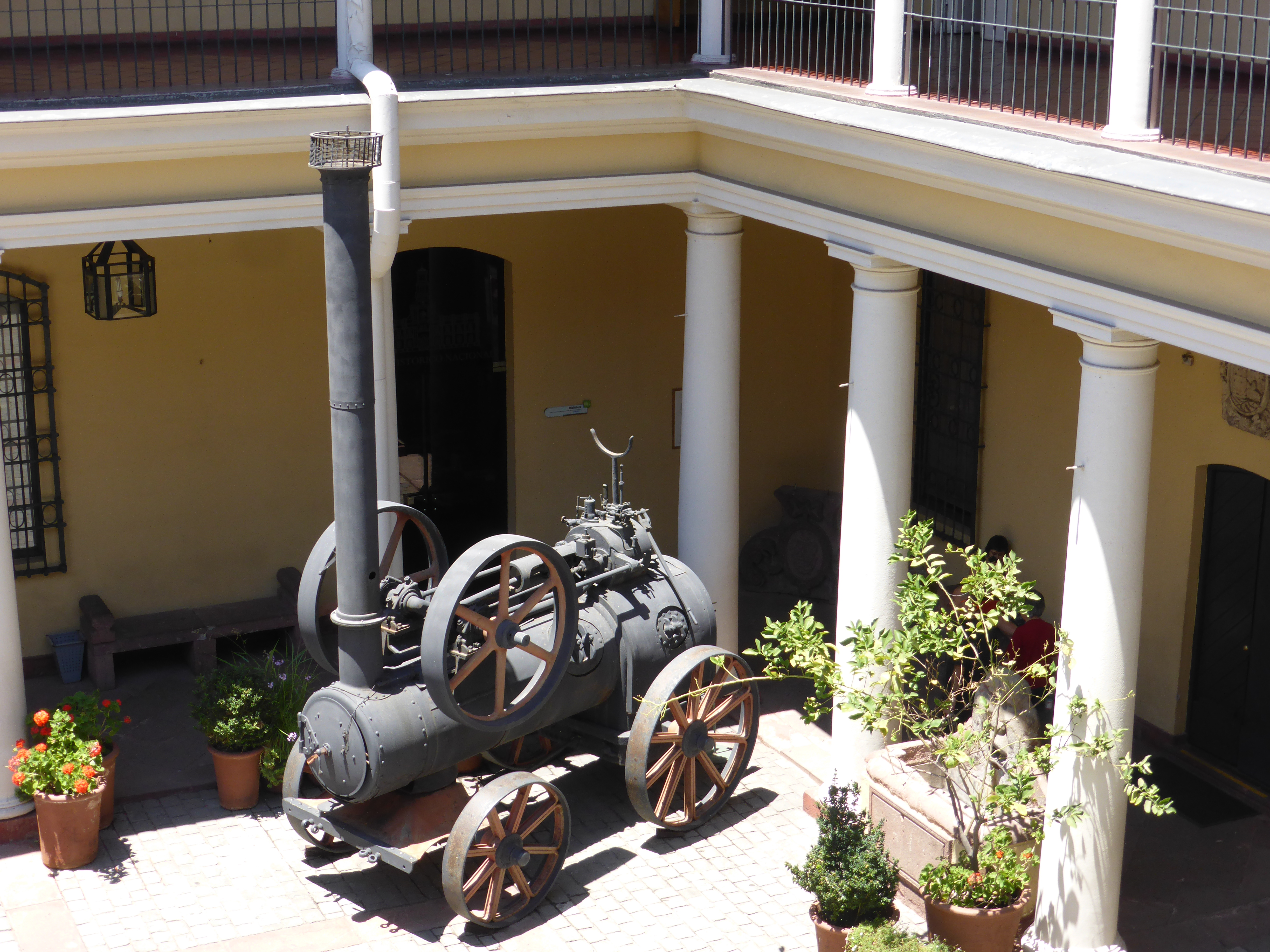 Patio del Museo Histórico Nacional (Santiago de Chile), con un locomóvil (motor para maquinaria agrícola) hacia el año 1900. Esta máquina de vapor locomóvil fue construida en Gainsborough (Lincolnshire), Inglaterra, por "Marshall Sons & Cº Limited".